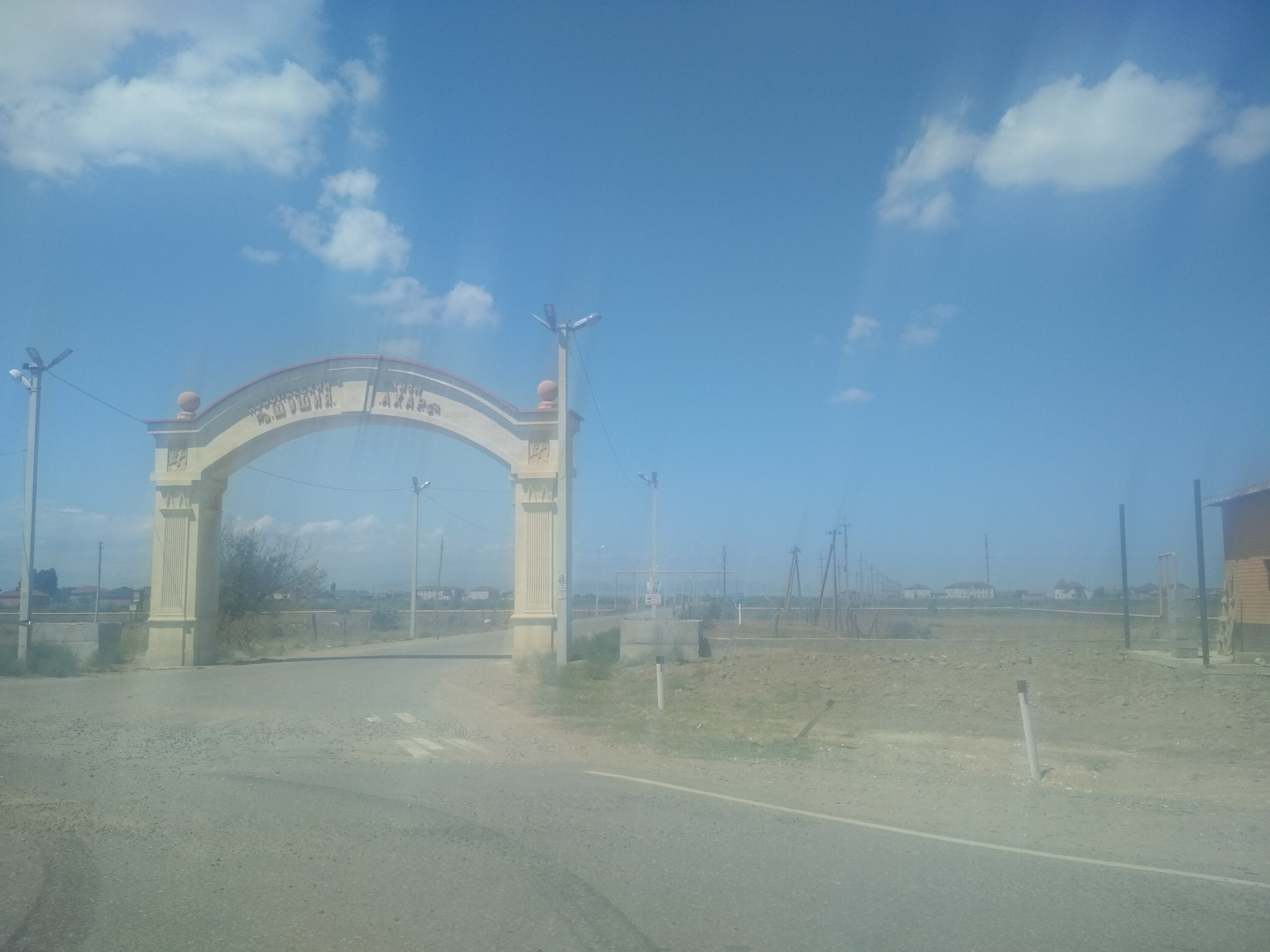 Нохчийн: Арка Шушия и Ахар